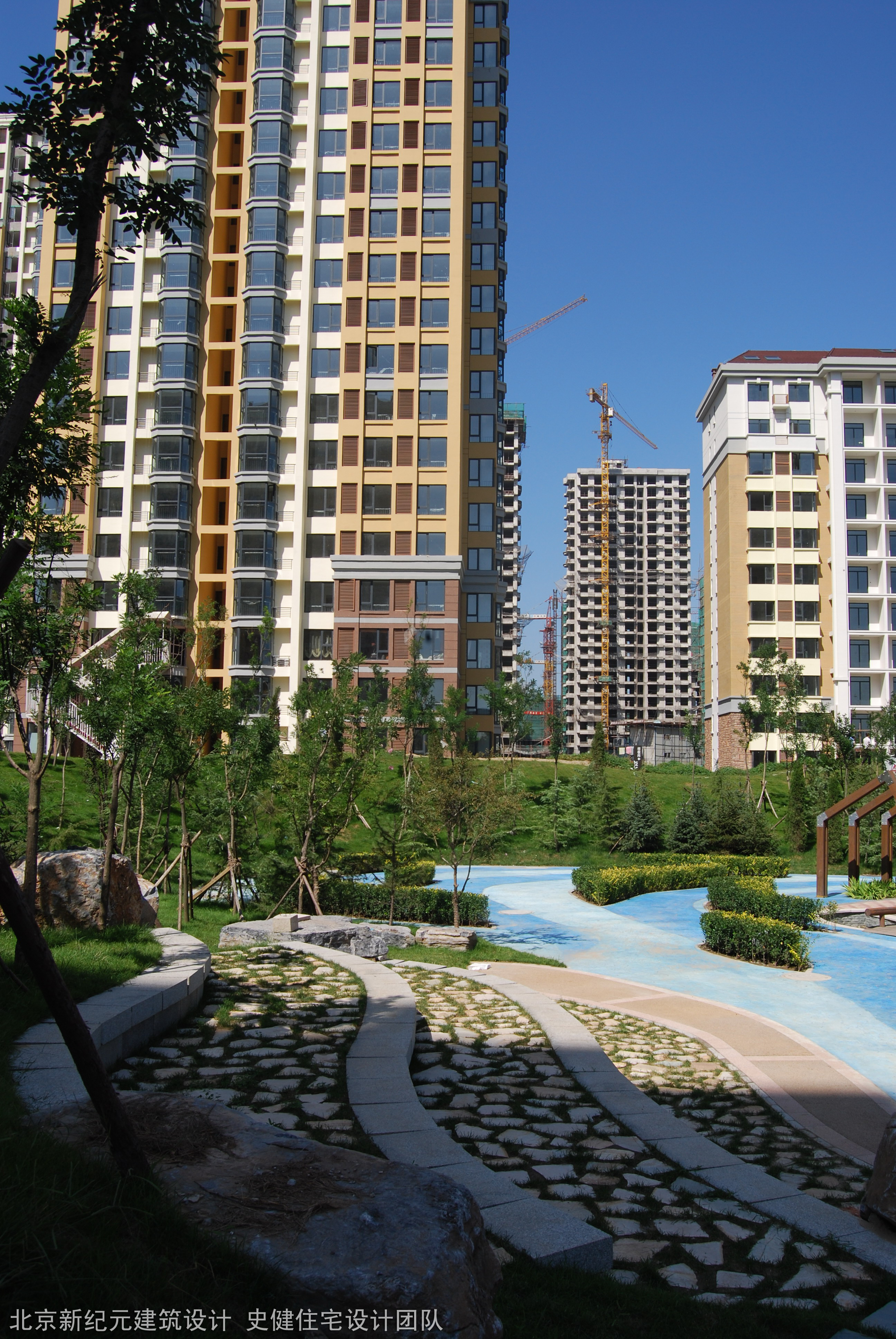 美林湾